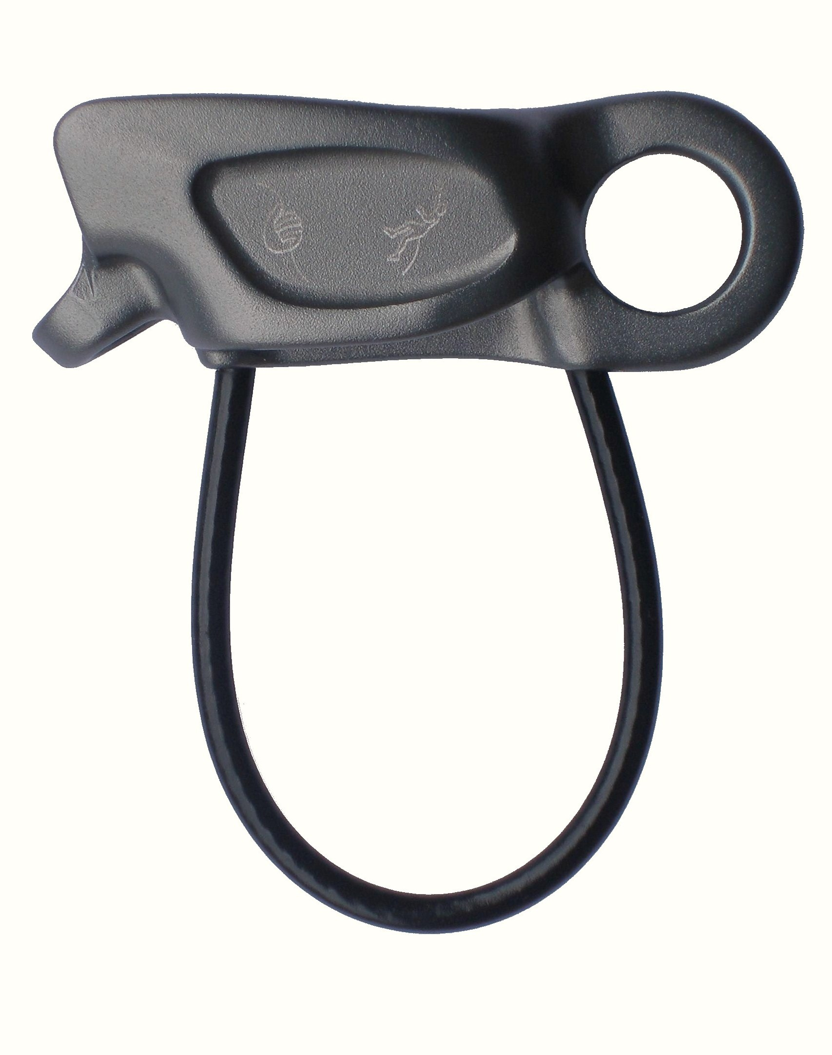 ein unbenutzter, neuer ATC-Guide, ein so genannter Tube